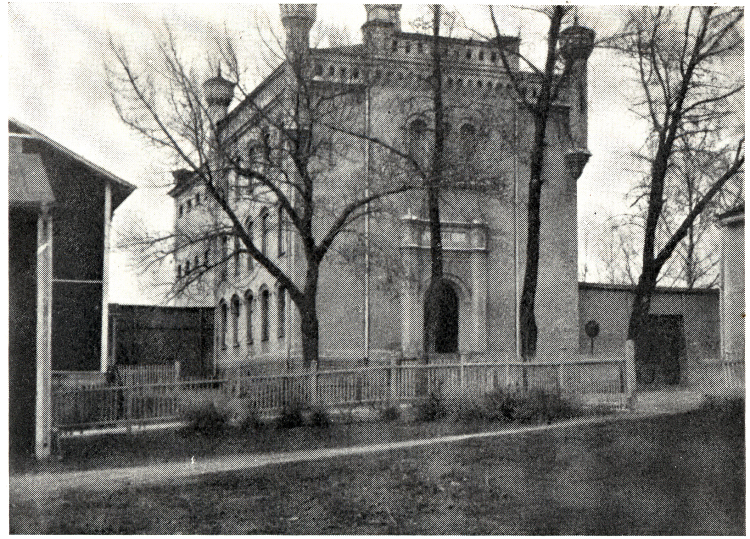 Länsfängelset i Östersund